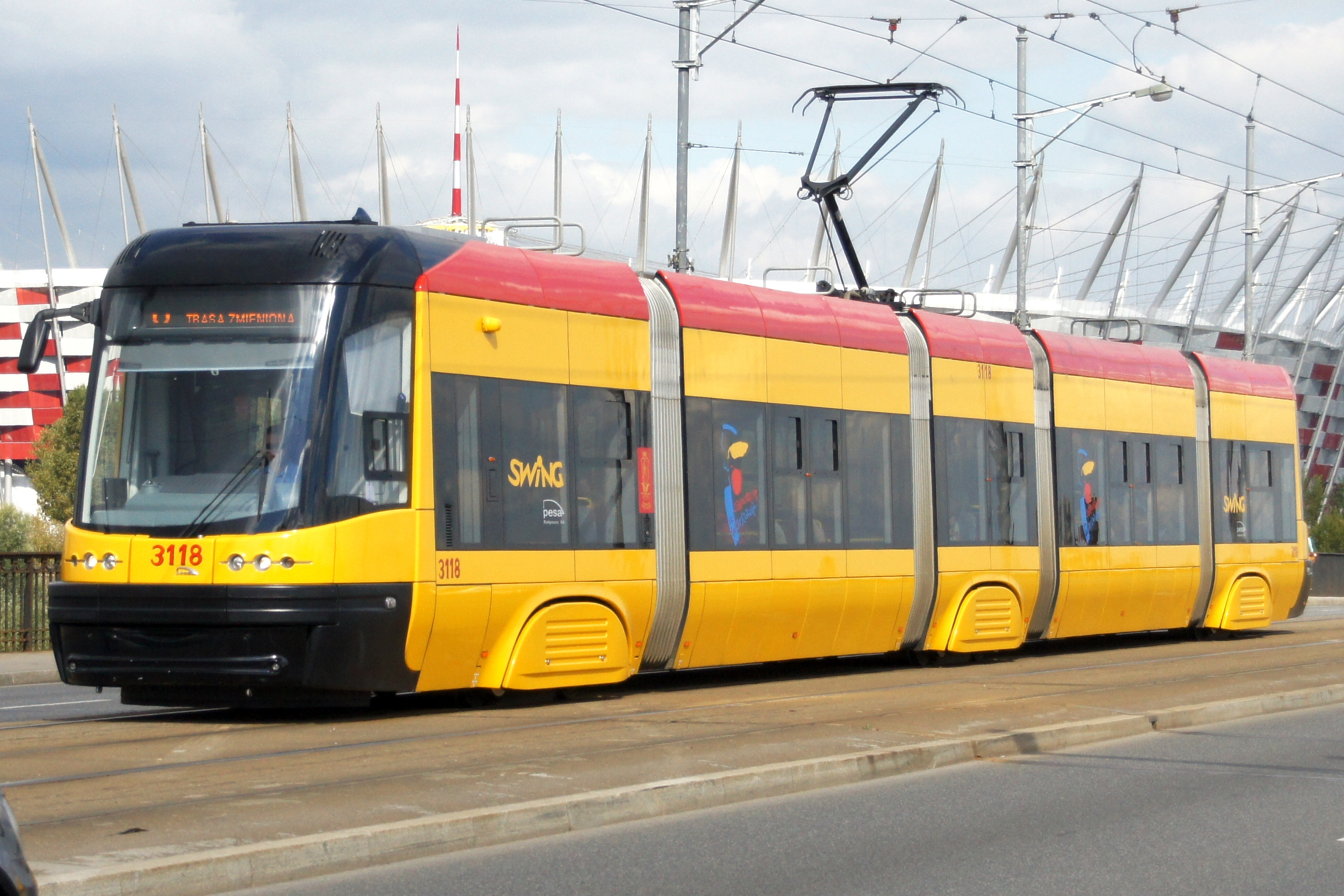 Tramwaj PESA 120Na SWING na Moście Poniatowskiego w Warszawie